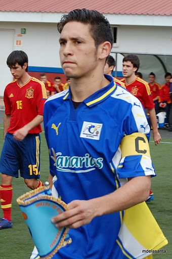 Imagen del partido disputado entre las selecciones de Canarias y España correspondiente a la Copa del Atlántico 2012